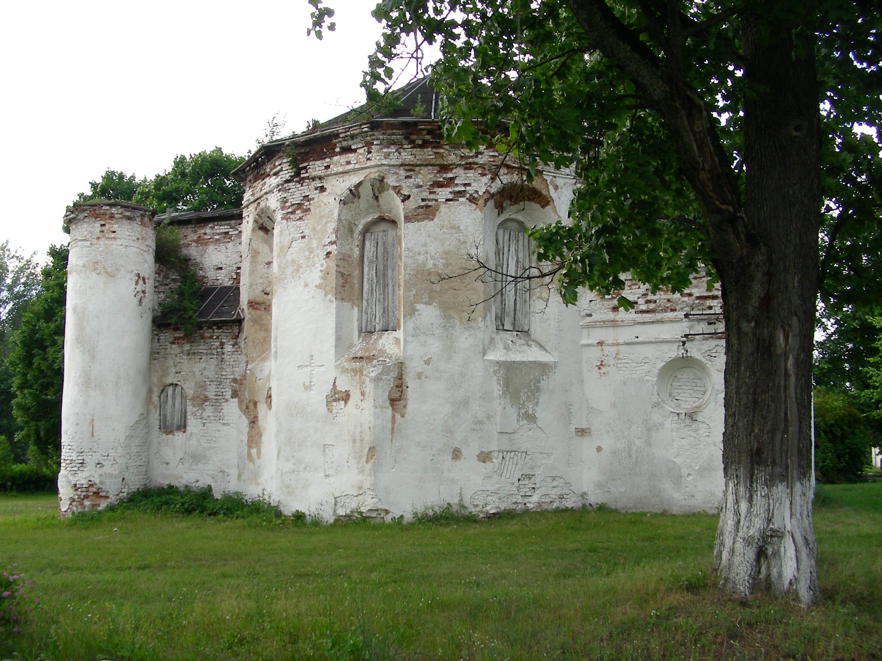 Беларуская (тарашкевіца): Фрагмэнты былой сядзібы «Кухцічы»: кальвінскі збор, парк, афіцына, гаспадарчыя пабудовы, стайня, млын. пас. Першамайск This is a photo of Belarusian heritage monument. Reference number: 612Г000628 ( WLM)